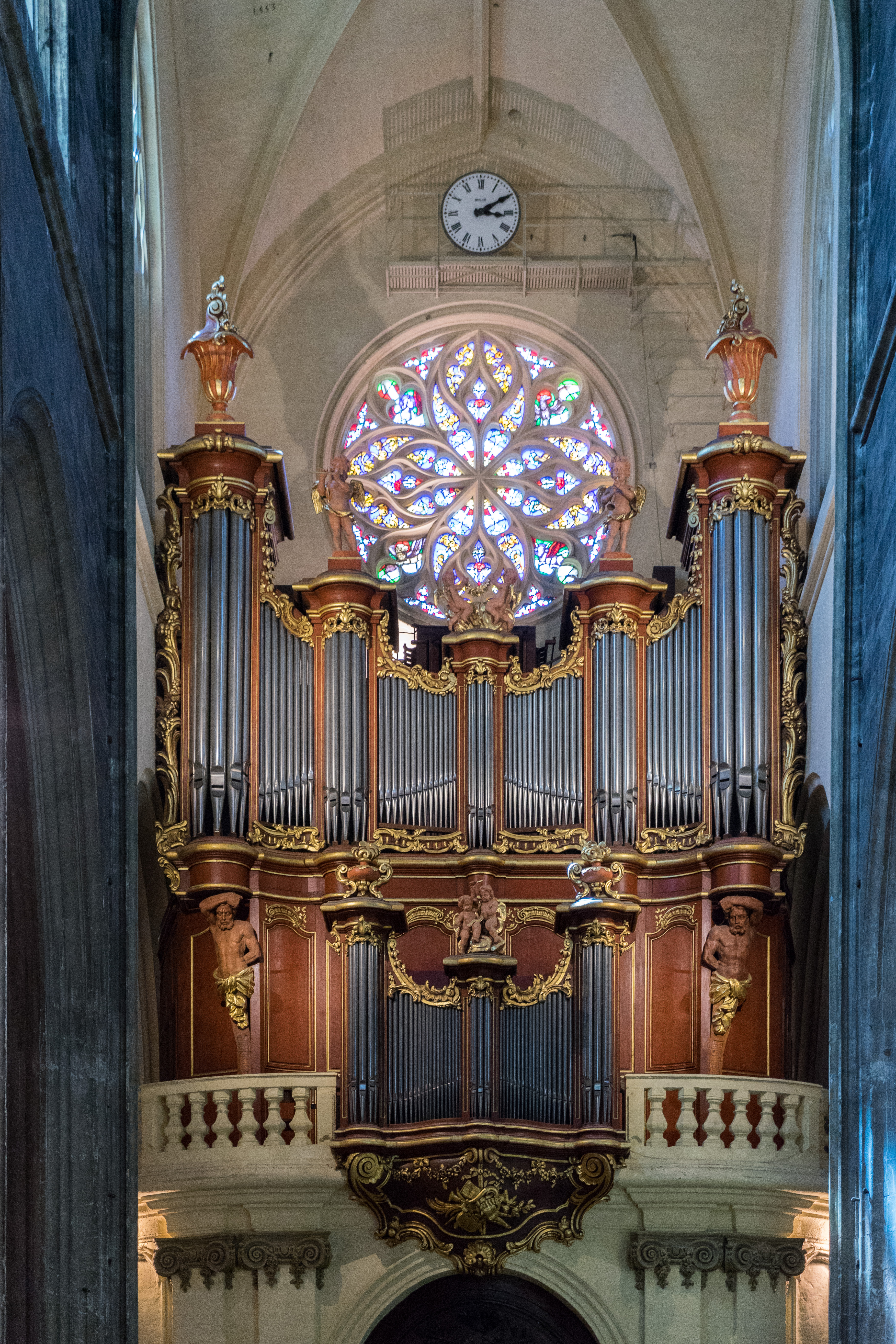 Bordeaux - Basilique Saint-Michel - Orgue